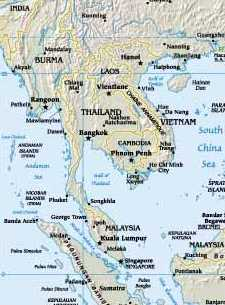 Hinterindien.